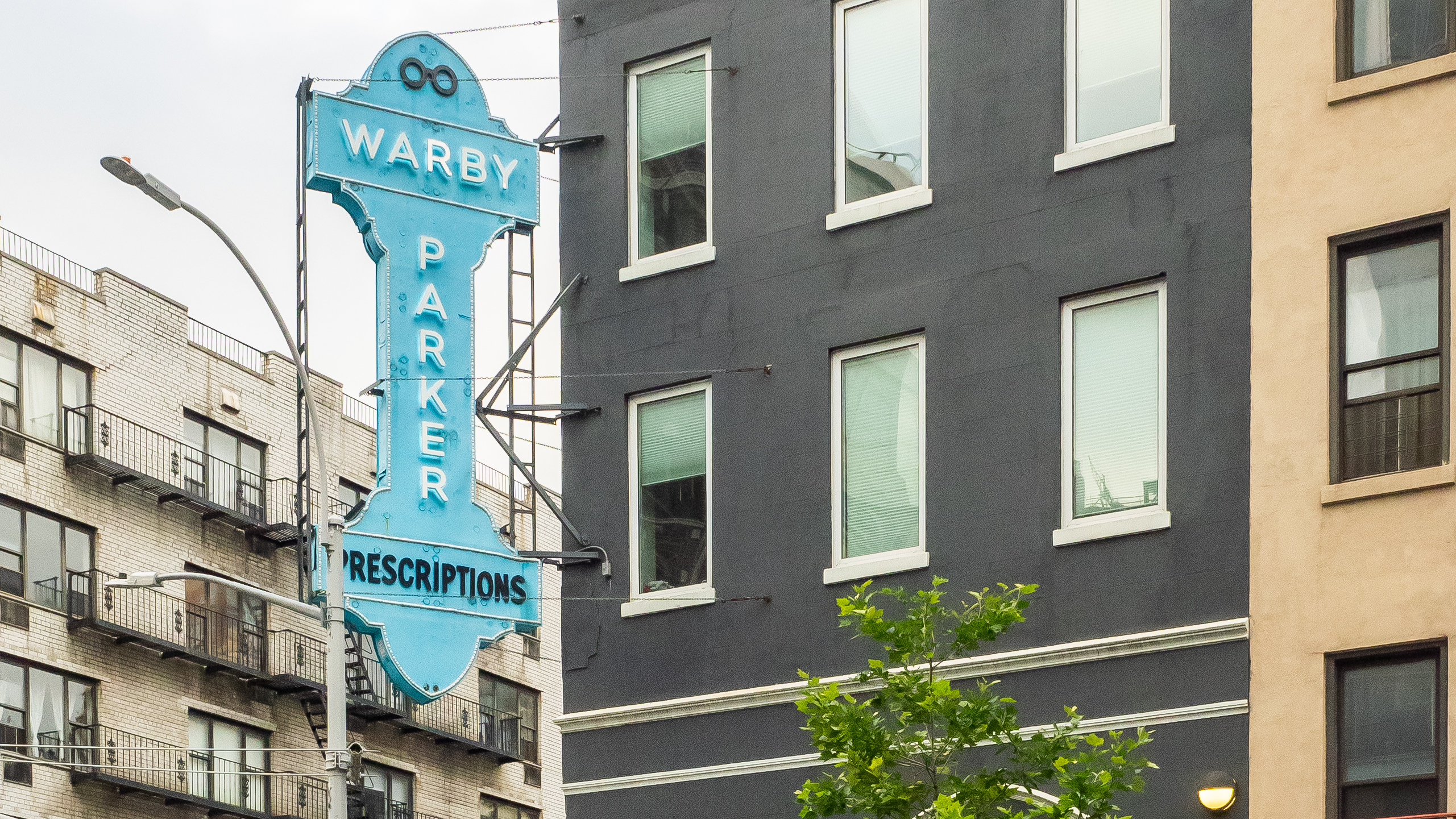 Upper East Side, NYC